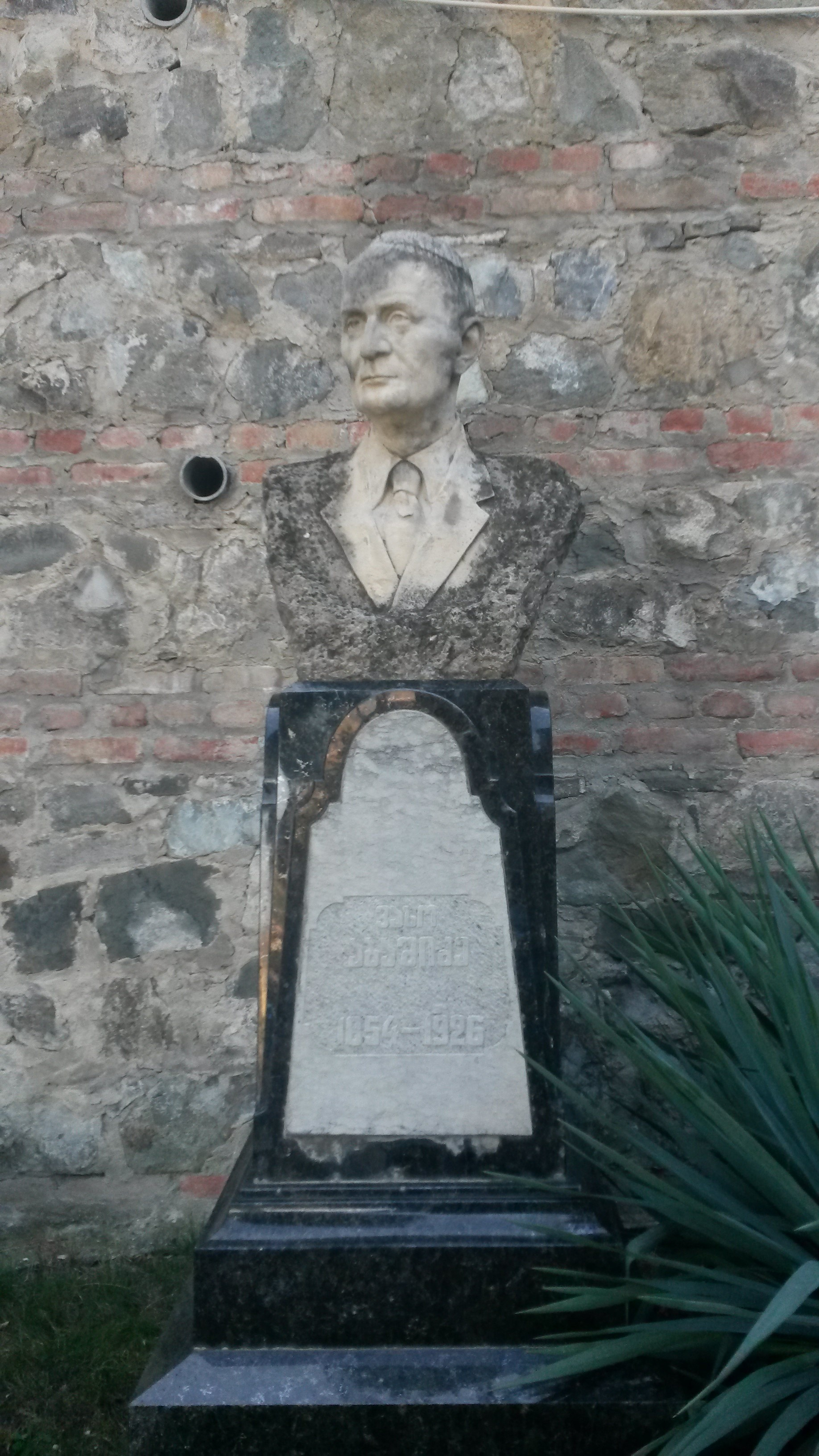 მთაწმინდის პანთეონი